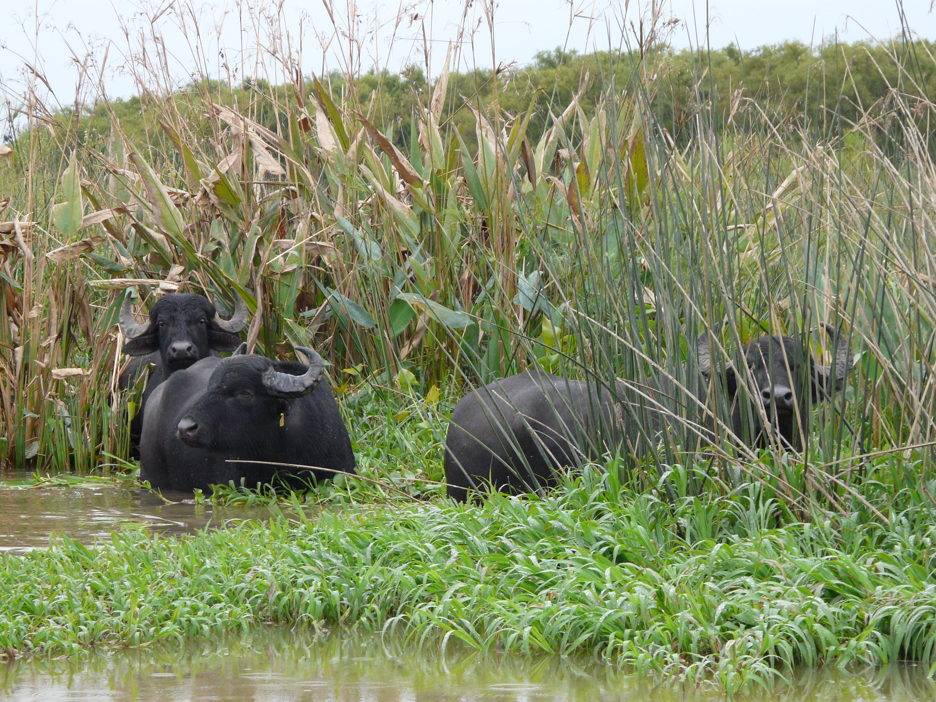 Grupo de búfalos en el humedal.